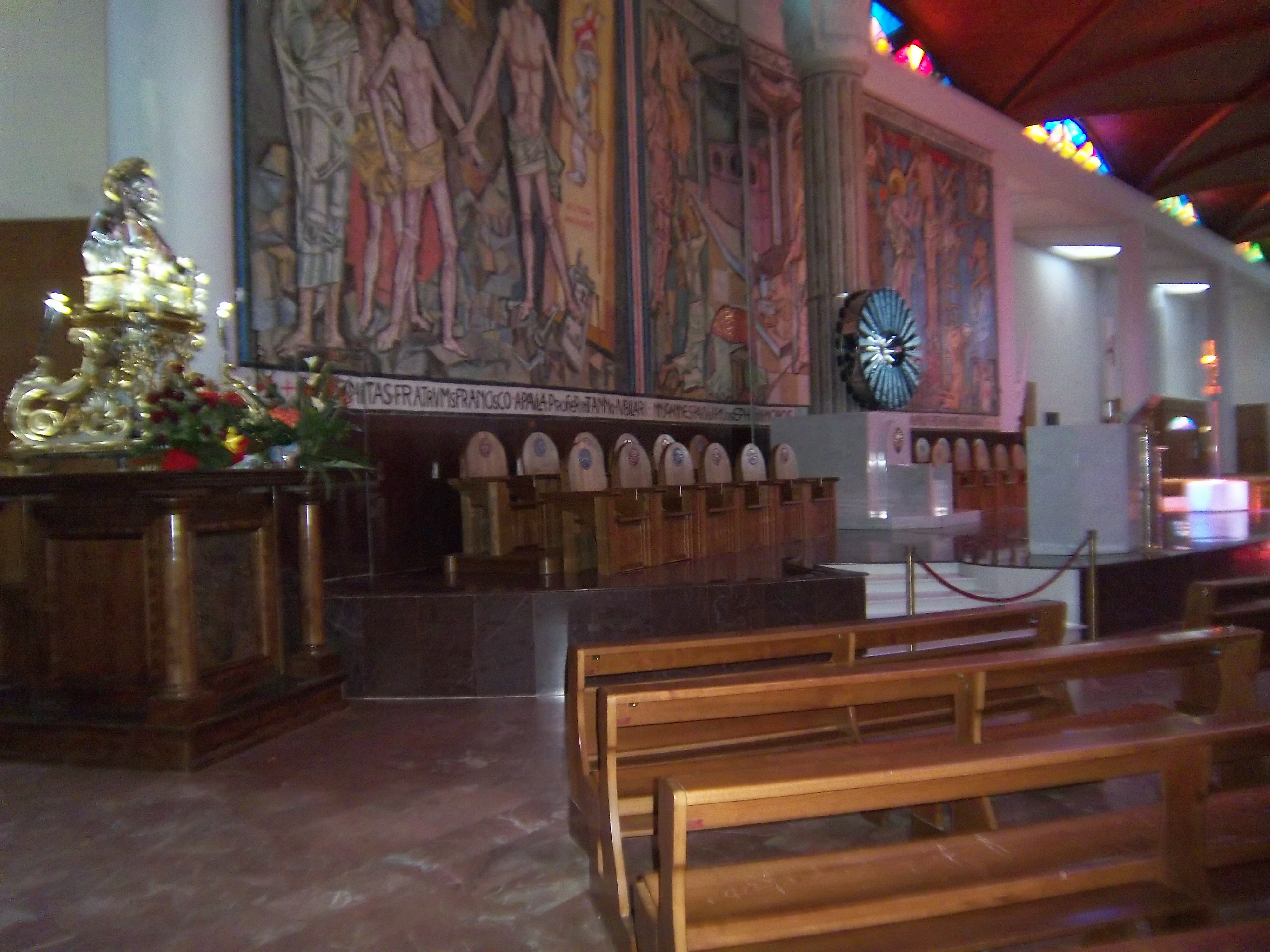 Foto Santuario di San Francesco di Paola ( Maggio 2013).